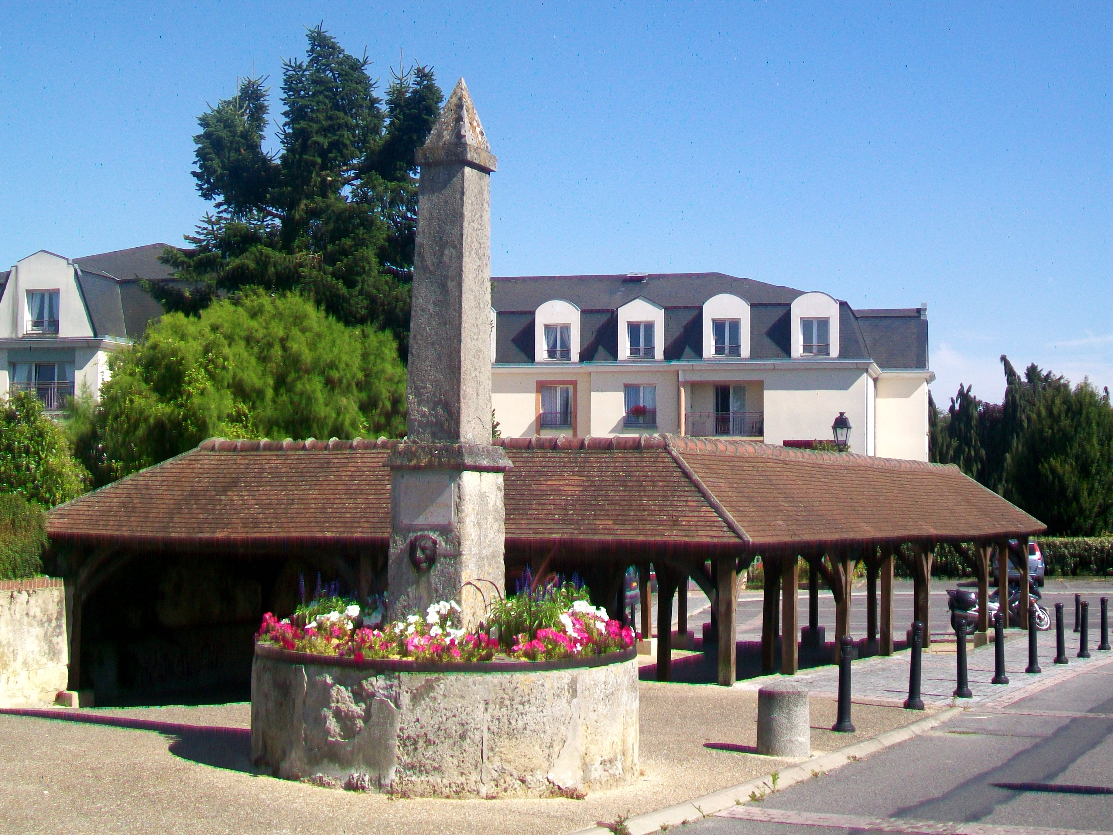 La fontaine et l'ancien lavoir (aujourd'hui sans bassins), rue de la Fontaine.